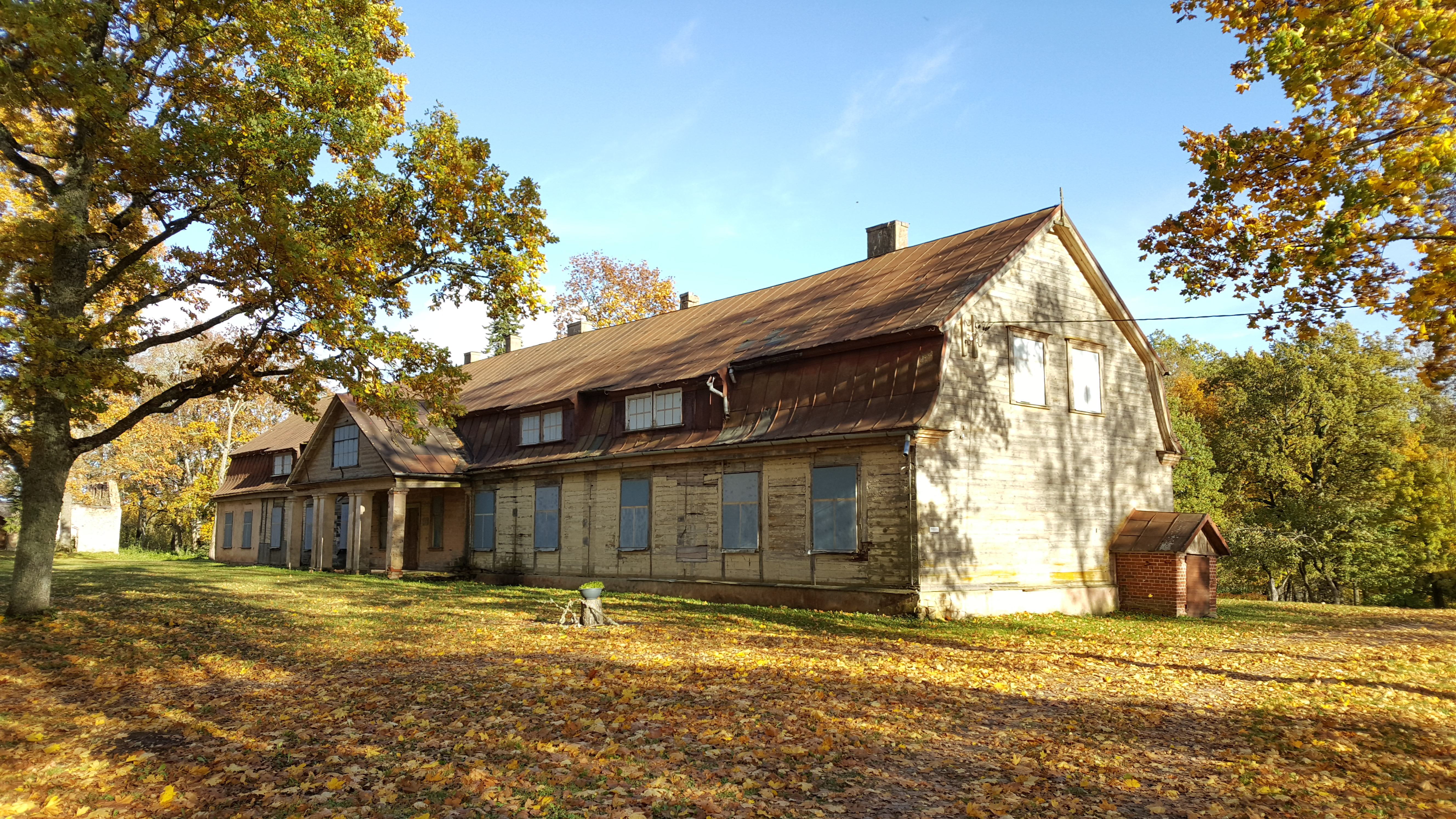 Liepa mõisa häärber 2017. aastal.